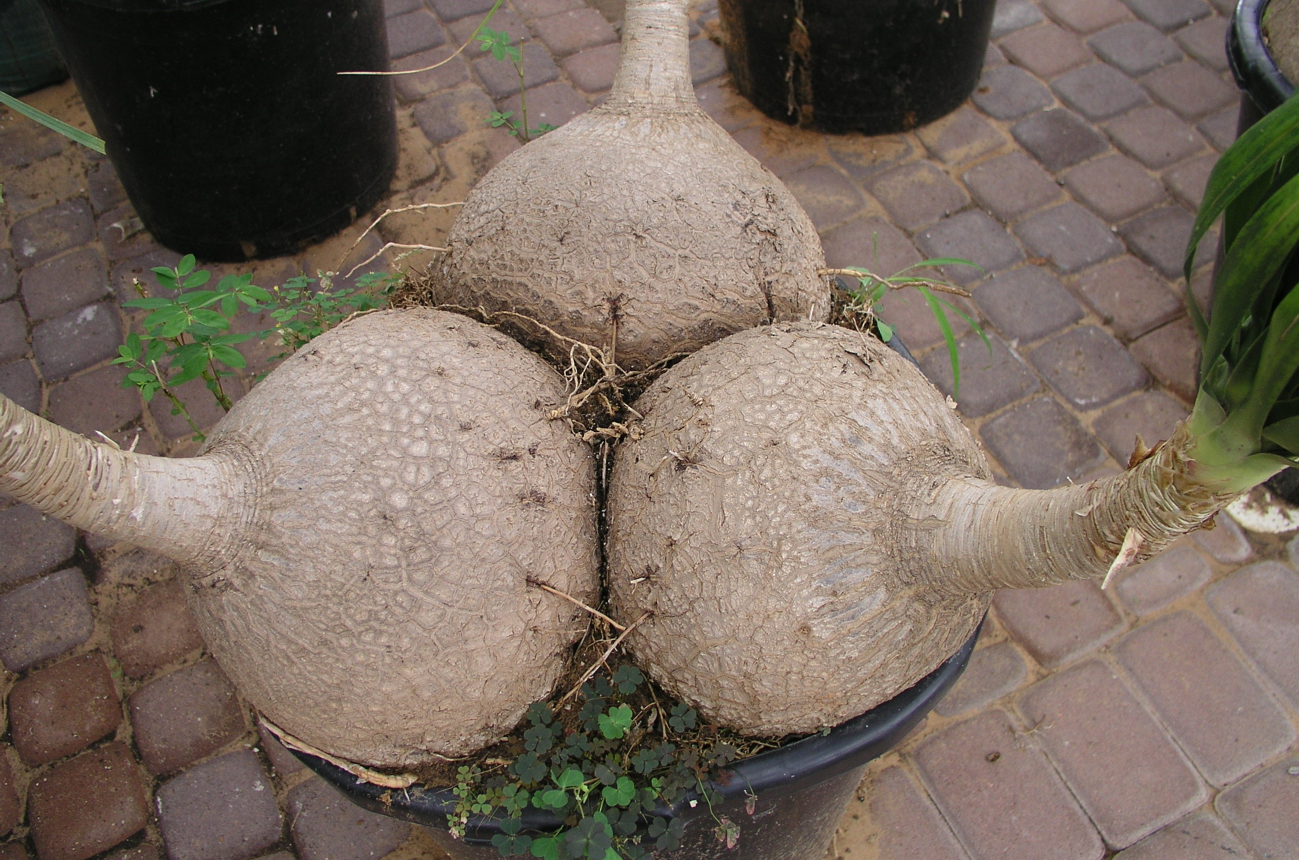 Beaucarnea spec.